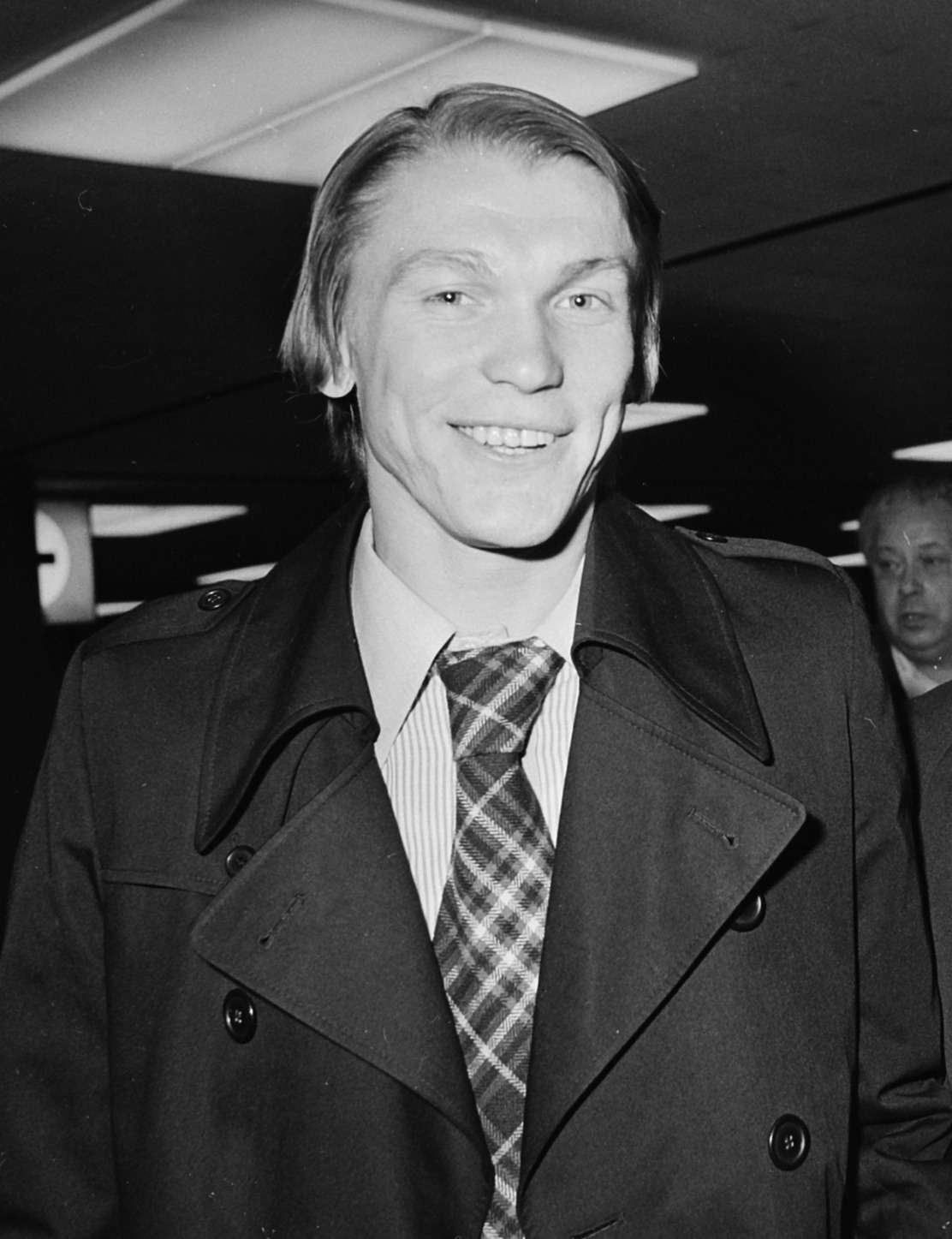 Aankomst Schiphol Russisch elftal; sterspeler Blochin (l) met trainer Simoniayev